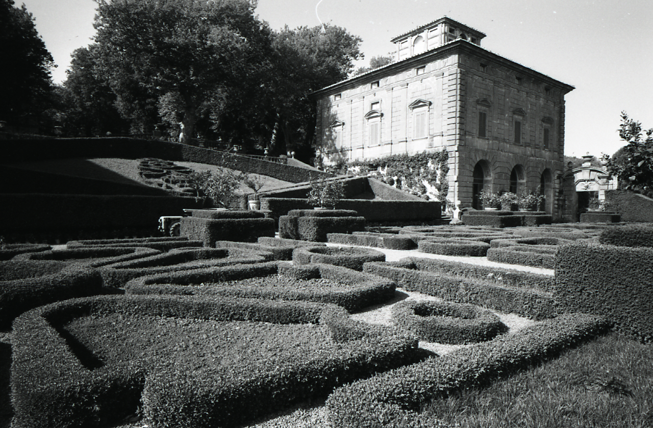 Servizio fotografico : Viterbo, 1966 / Paolo Monti. - Strisce: 7, Fotogrammi complessivi: 38 : Negativo b/n, gelatina bromuro d'argento/ pellicola ; 35 mm. - ((I fotogrammi hanno una doppia numerazione. - Sul portanegativi: Leica M - Agfa 17. - Occasione: Pubblicazione: "Eugenio RICCOMINI, Ordine e vaghezza: scultura in Emilia nell'età barocca, Bologna, Zanichelli, 1972"